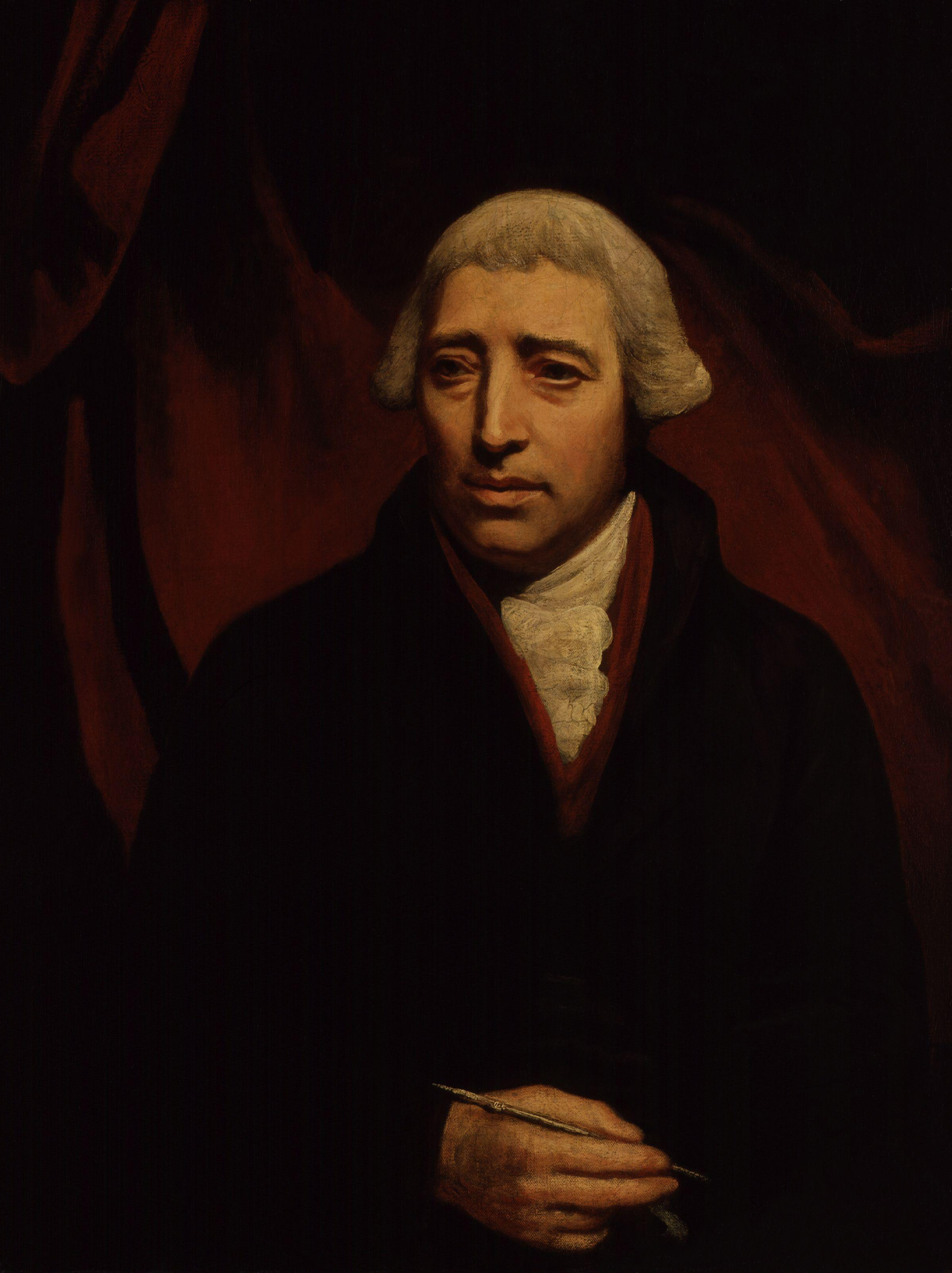 Portrait of Francesco Bartolozzi (1727-1815), Italian engraver